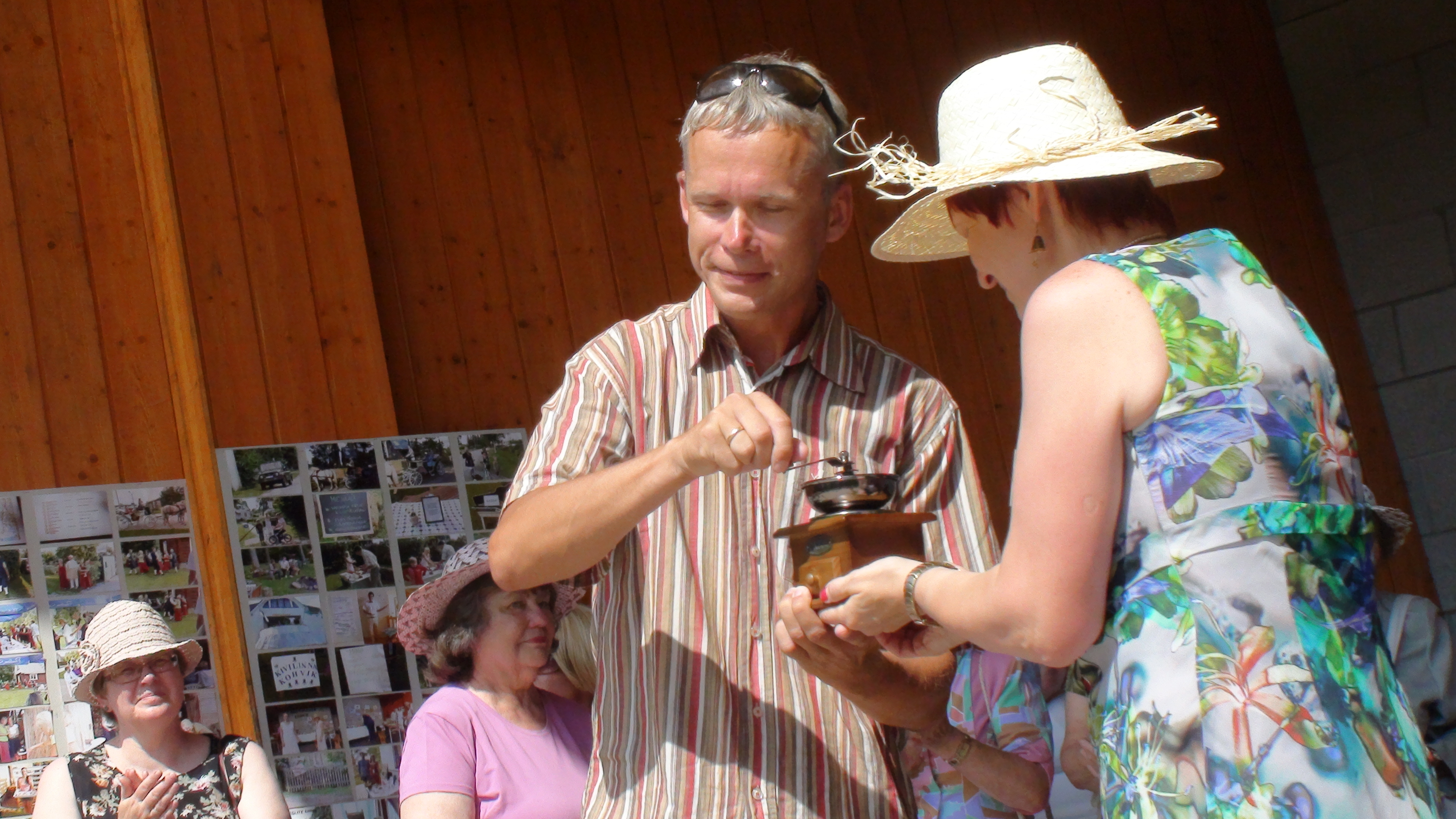 Raasiku vallavanem Aare Ets avab Aruküla kohvikutepäeva esimeste kohviveski pööretega. Sarnaselt avatakse kohvikutepäev traditsiooniliselt ka Kärdlas, kus esimeseks jahvatajaks on linnapea.